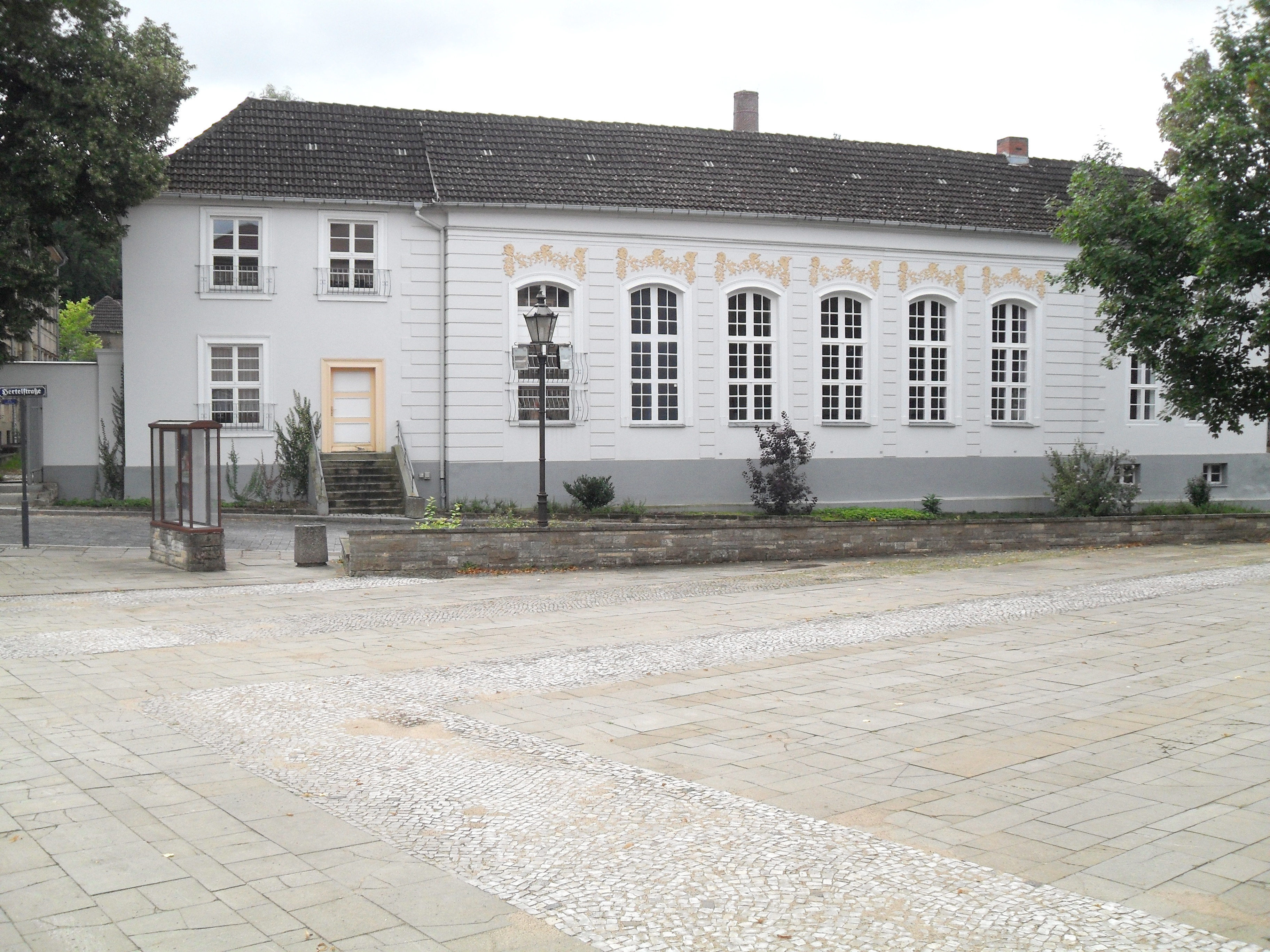 Das Hobe-Haus, auch „Weißes Herrenhaus“ genannt wurde 1740 in Neustrelitz erbaut. Im Festsaal befindet sich das Standesamt der Stadt. Hertelstraße 11-13